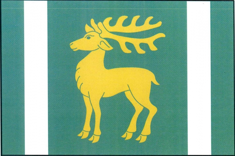 vlajka, Lhánice, okres Třebíč